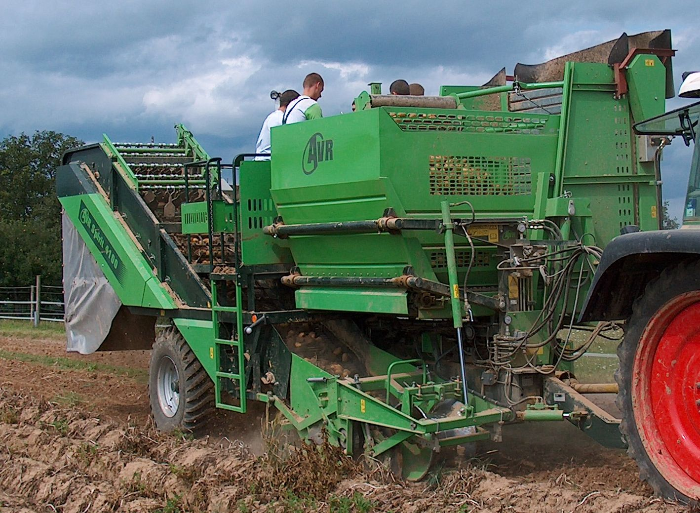 AVR-Kartoffelvollernter Spirit 4100, ein gezogener einreihiger Kartoffelroder